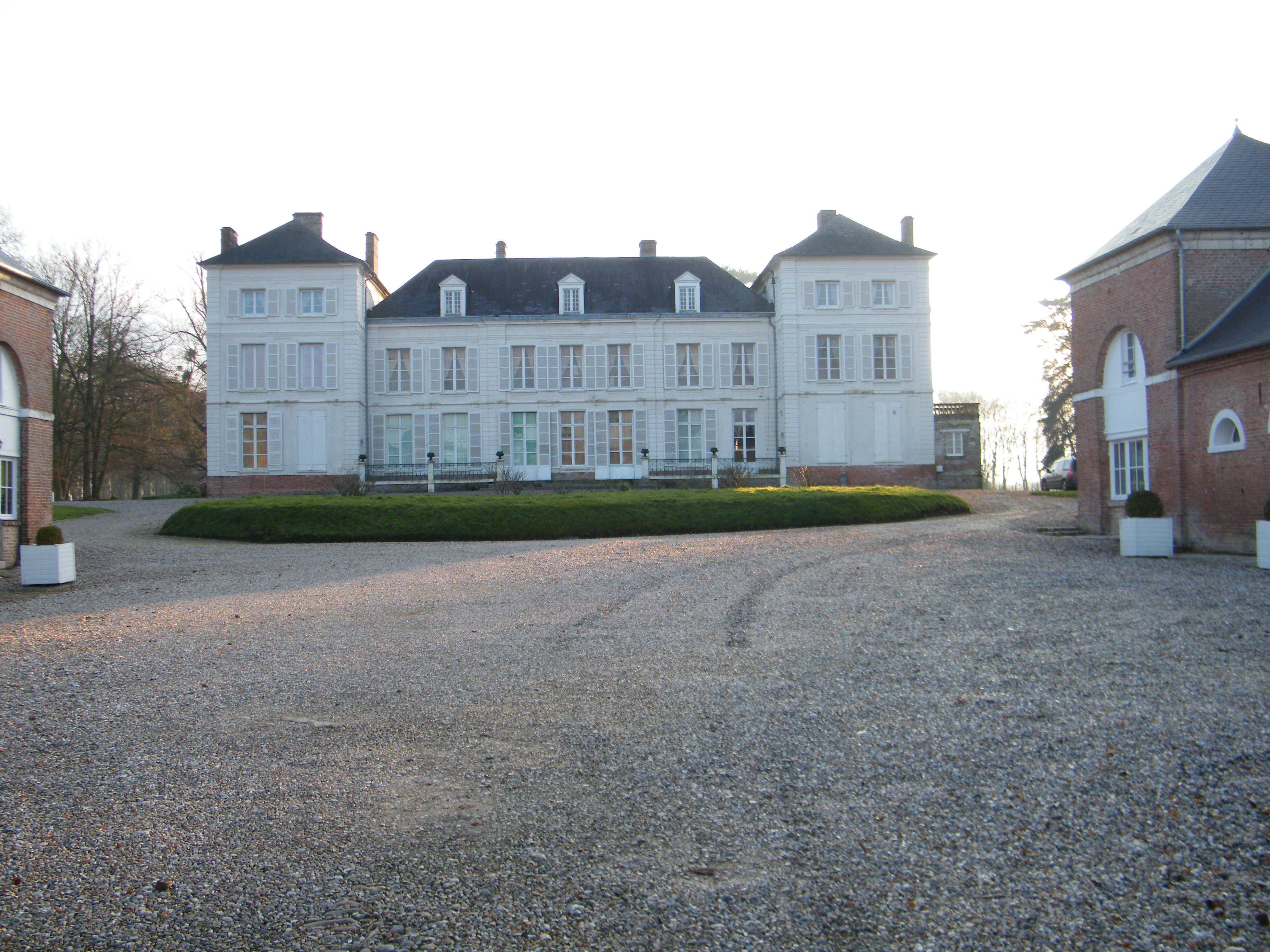 Château du Titre (Somme), façade nord.